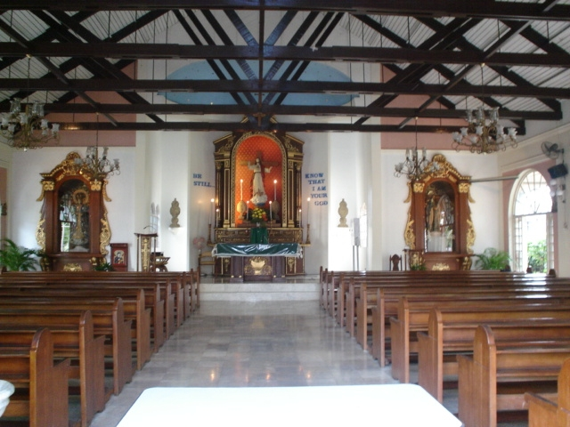 Richard Relucio